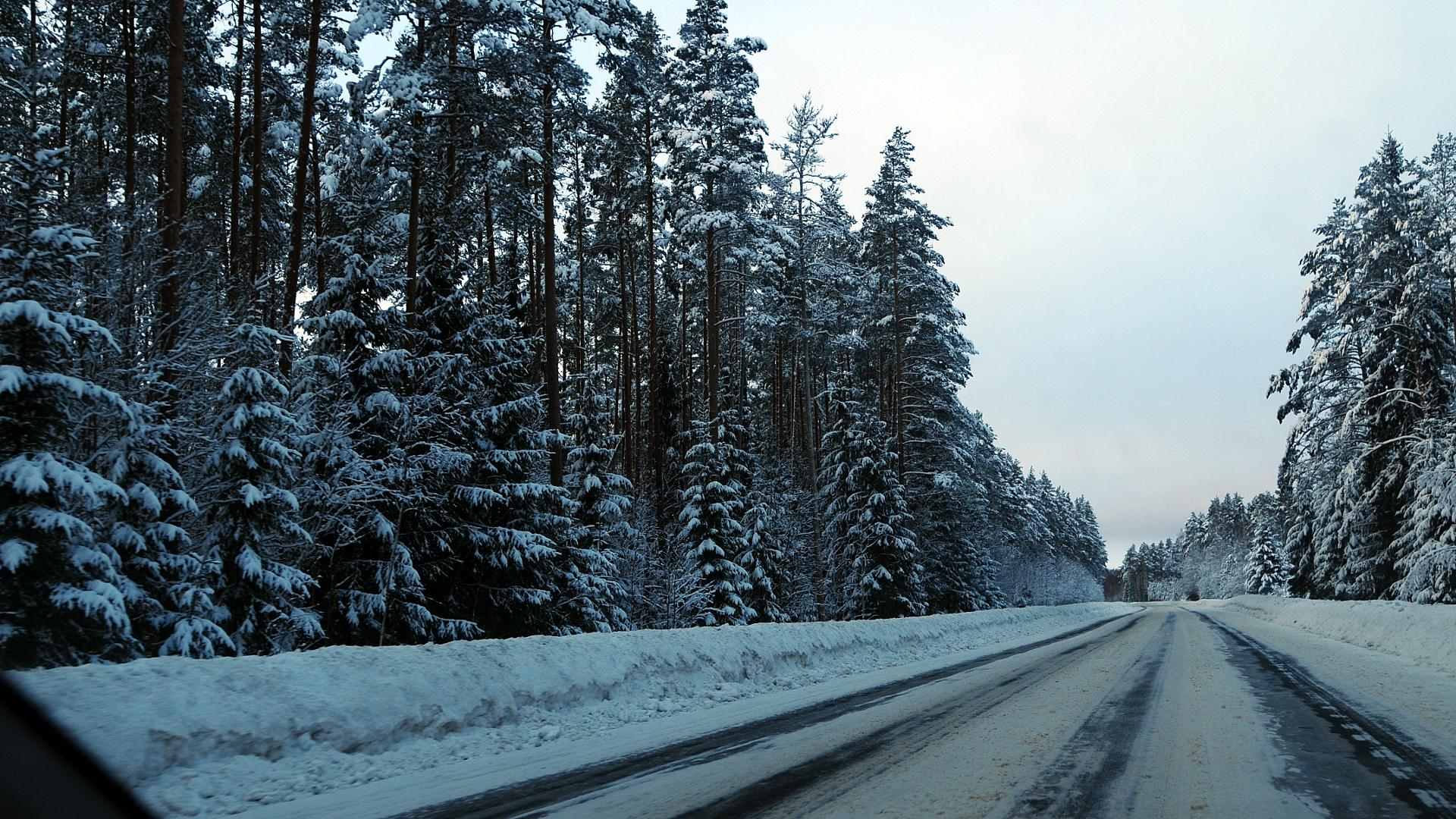 Talvine teeseisund on Piibe maanteel harilikult mõnevõrra kehvem kui Tartu maanteel, kuid ka liiklus on siin oluliselt rahulikum.